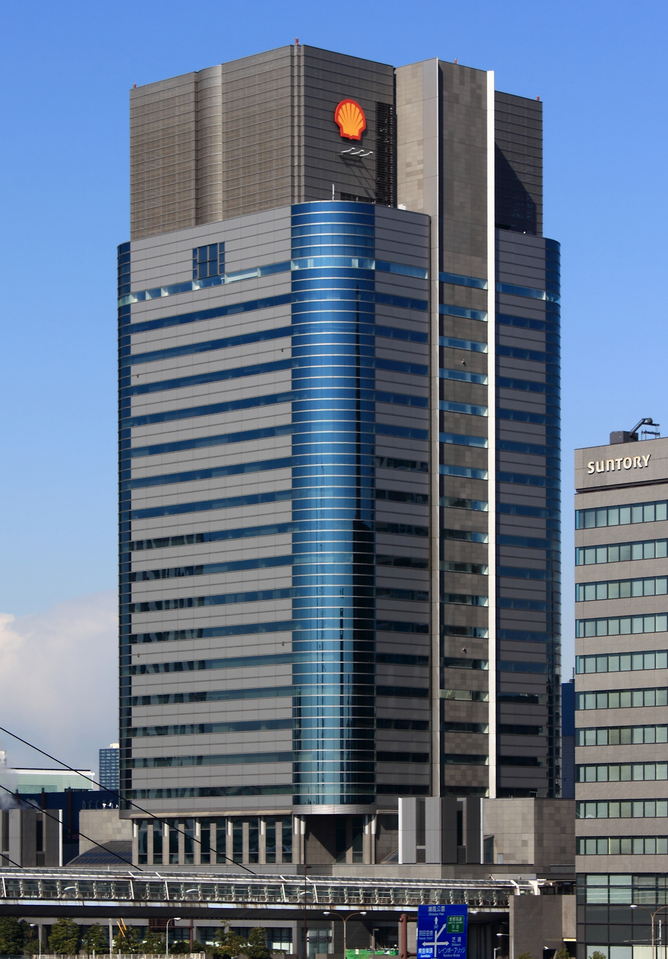 昭和シェル石油本社（台場フロンティアビル、東京都港区）。